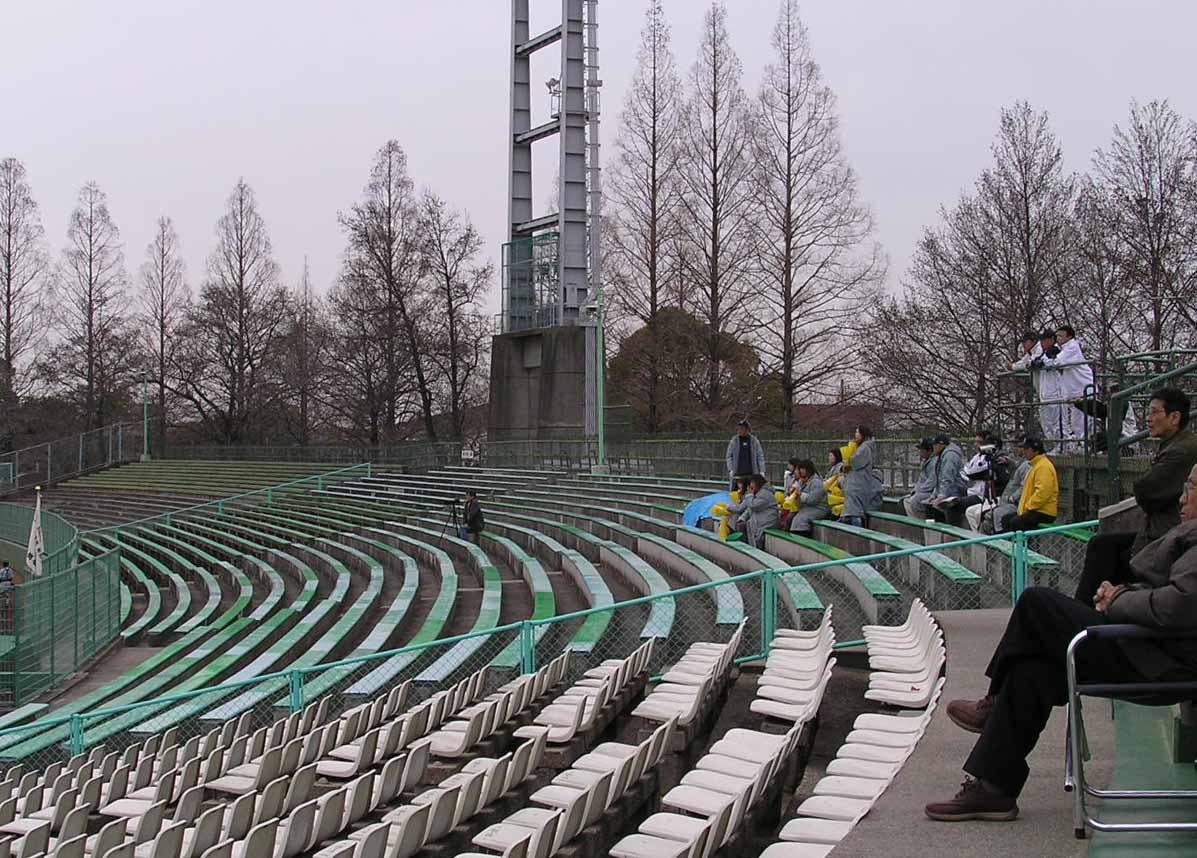 okayama baseball stadium